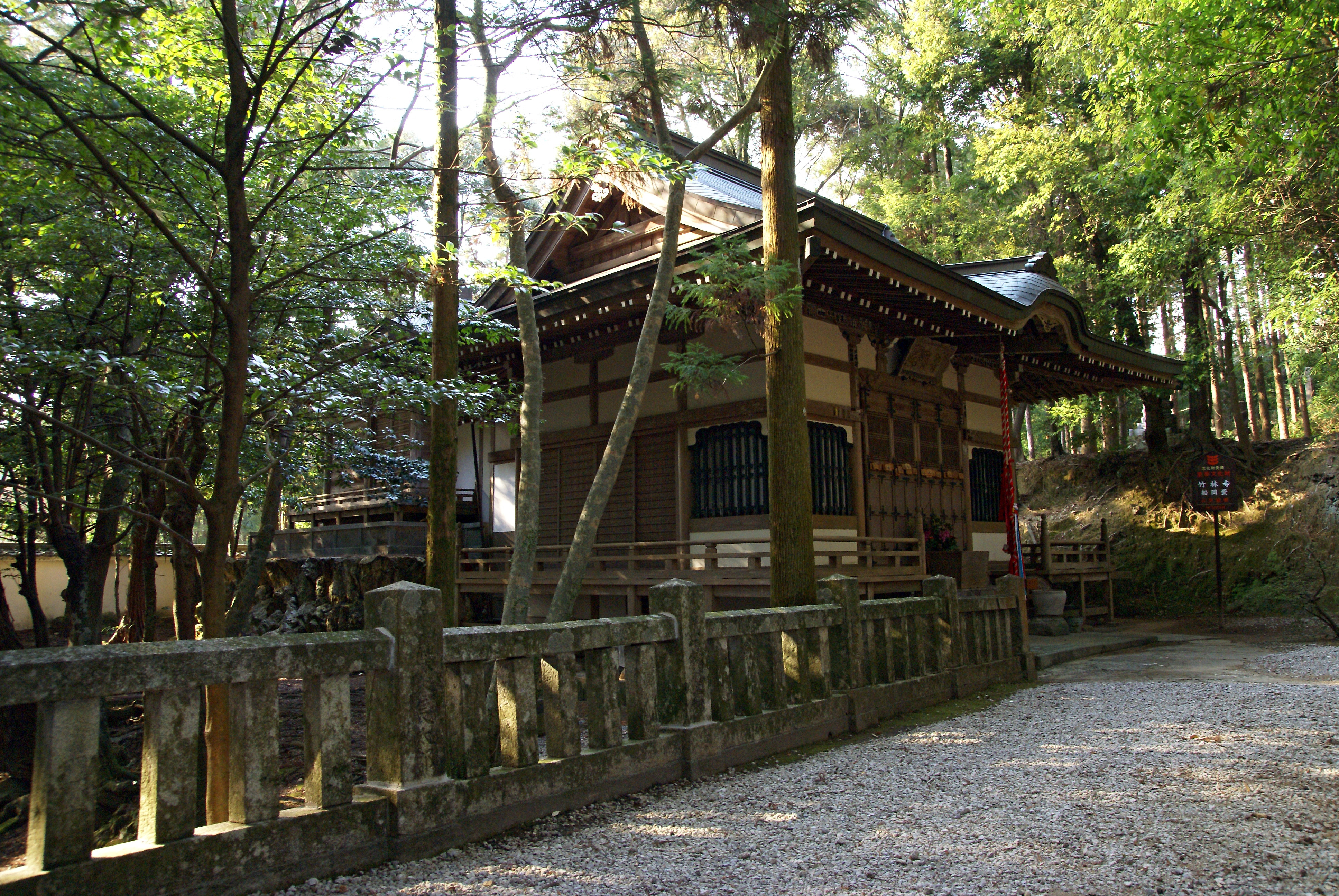 Chikurinji in Kochi, Kochi prefecture, Japan